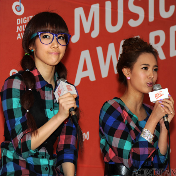 쥬얼리S, 메모리... 그리고 소녀시대!